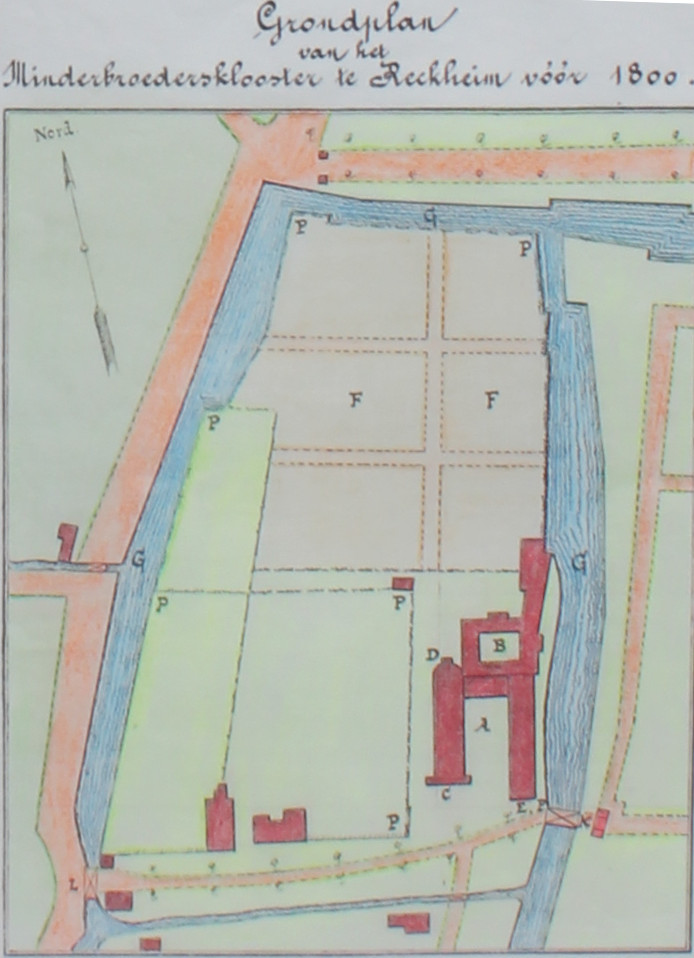 Grondplan van het minderbroedersklooster te Reckheim (Rekem)